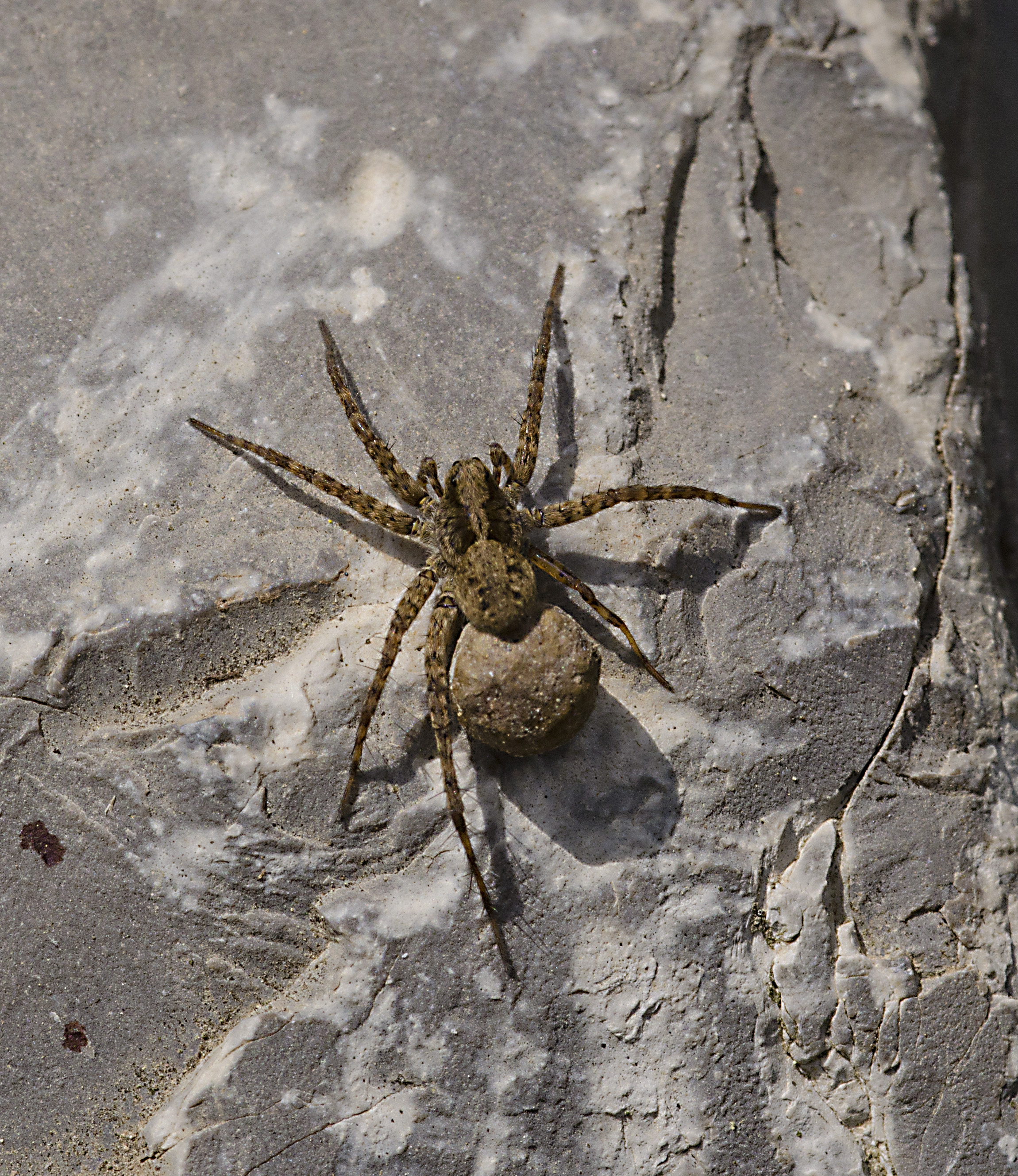 Pardosa amentata. Picture taken near Stuttgart, Germany